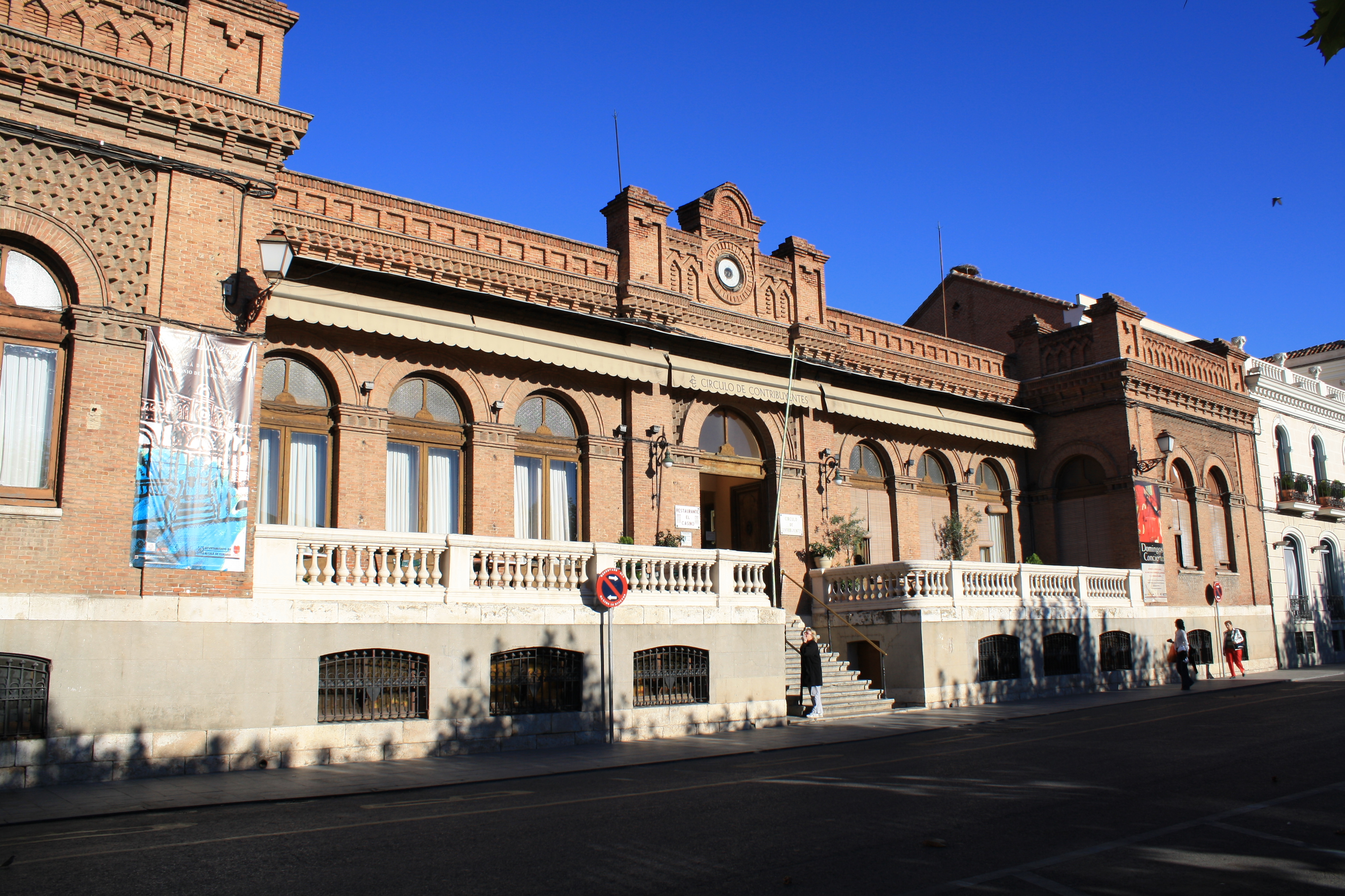 Casino. Alcalá de Henares. Comunidad de Madrid. España